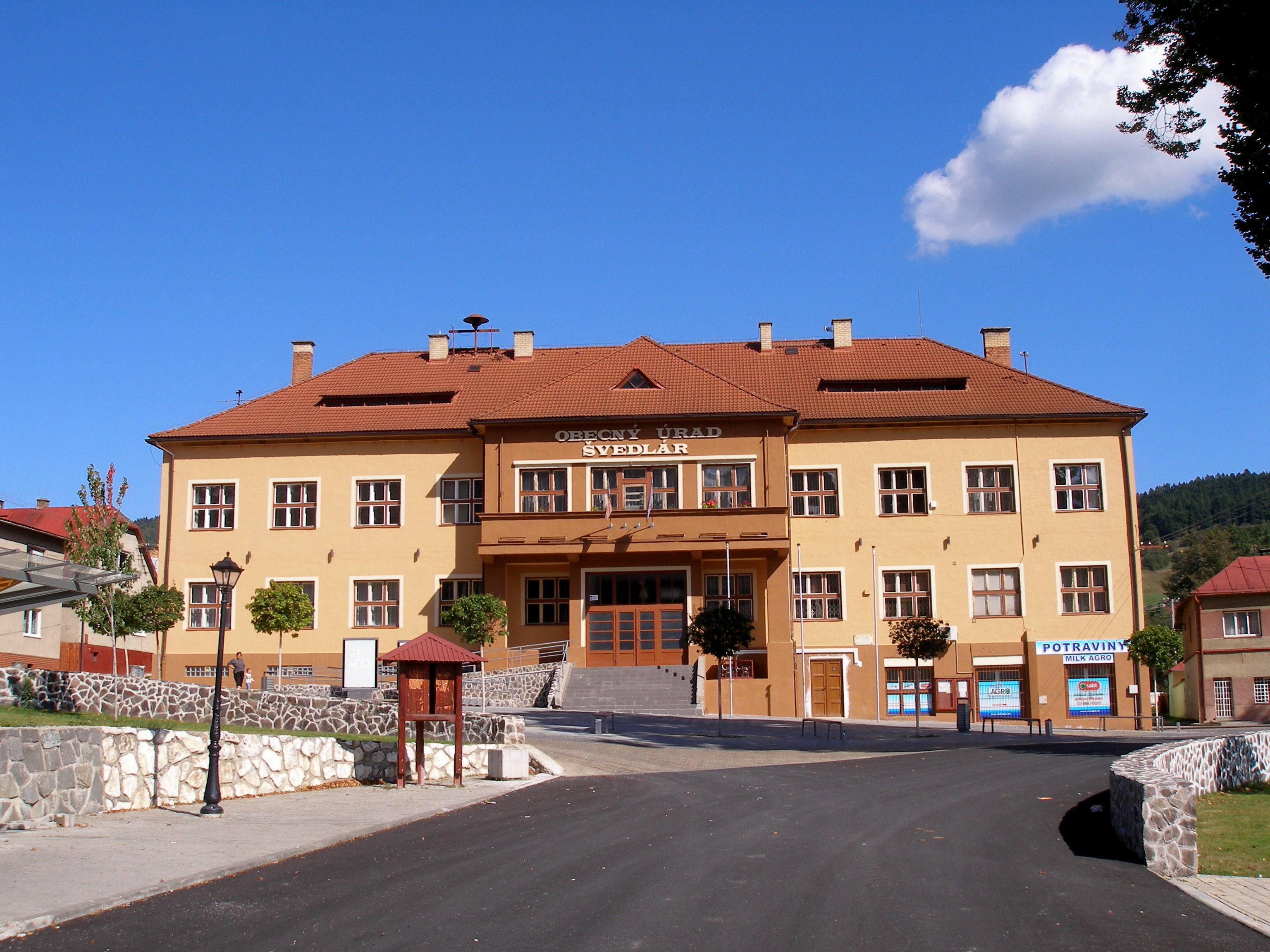 Spišská obec Švedlár. Okres Gelnica